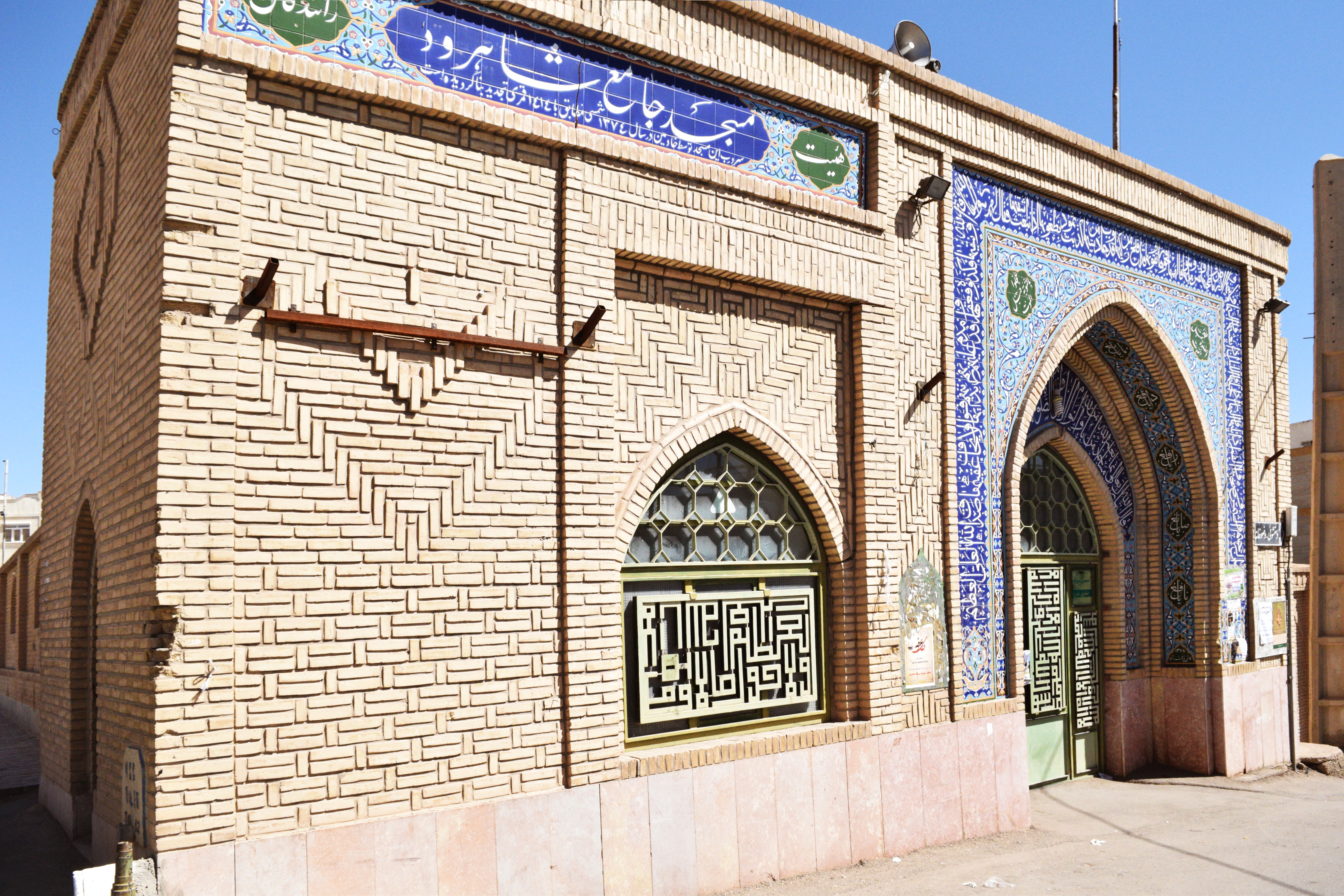 مسجد جامع شاهرود